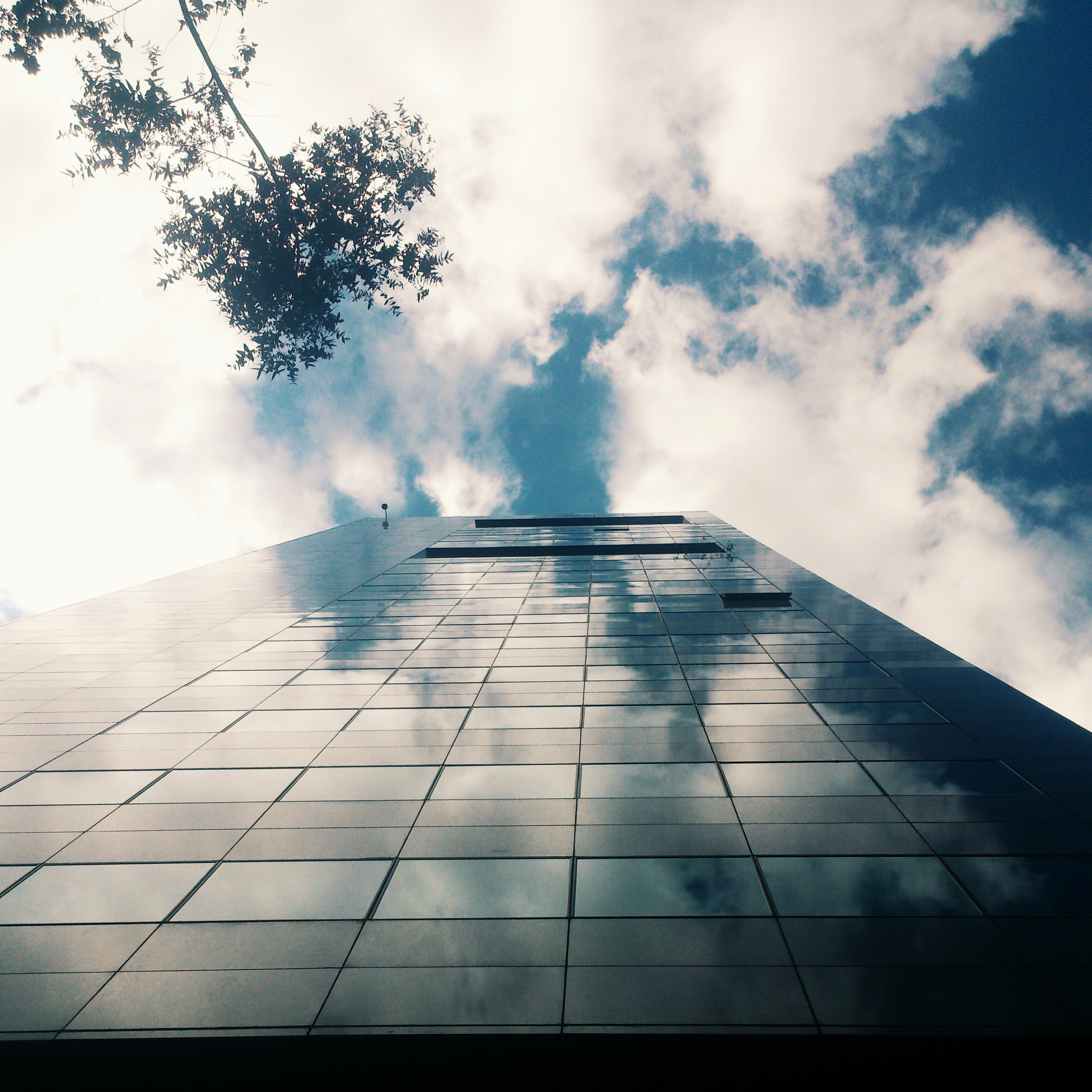 Fachada del edificio de la Bolsa de Valores en Bogotá, Colombia. Autor: Juan Camilo Alfonso Mesquida